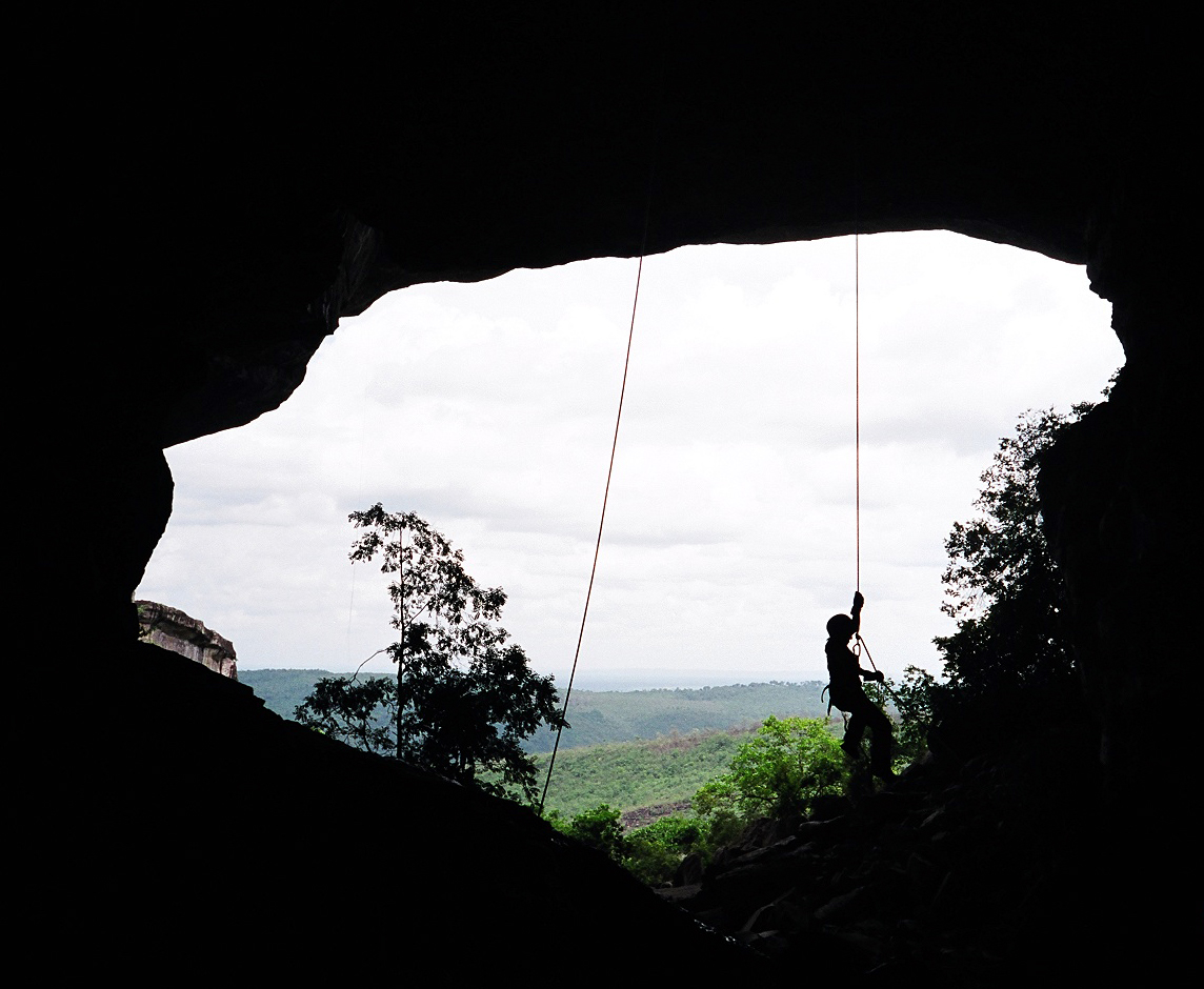 View of the exterior from inside a cave. One person descends by rappel. Chapada Diamantina, Bahia, Brazil. Entrada de uma caverna na Chapada Diamantina, Bahia Brasil. Uma pessoa desce o pórtico em rapel.